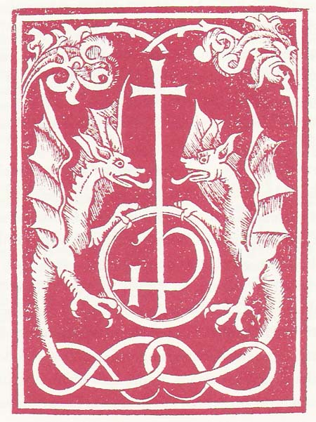 Drucksigent des Speyerer Buchdruckers Peter Drach, aus dem Mainzer Psalter, 1497